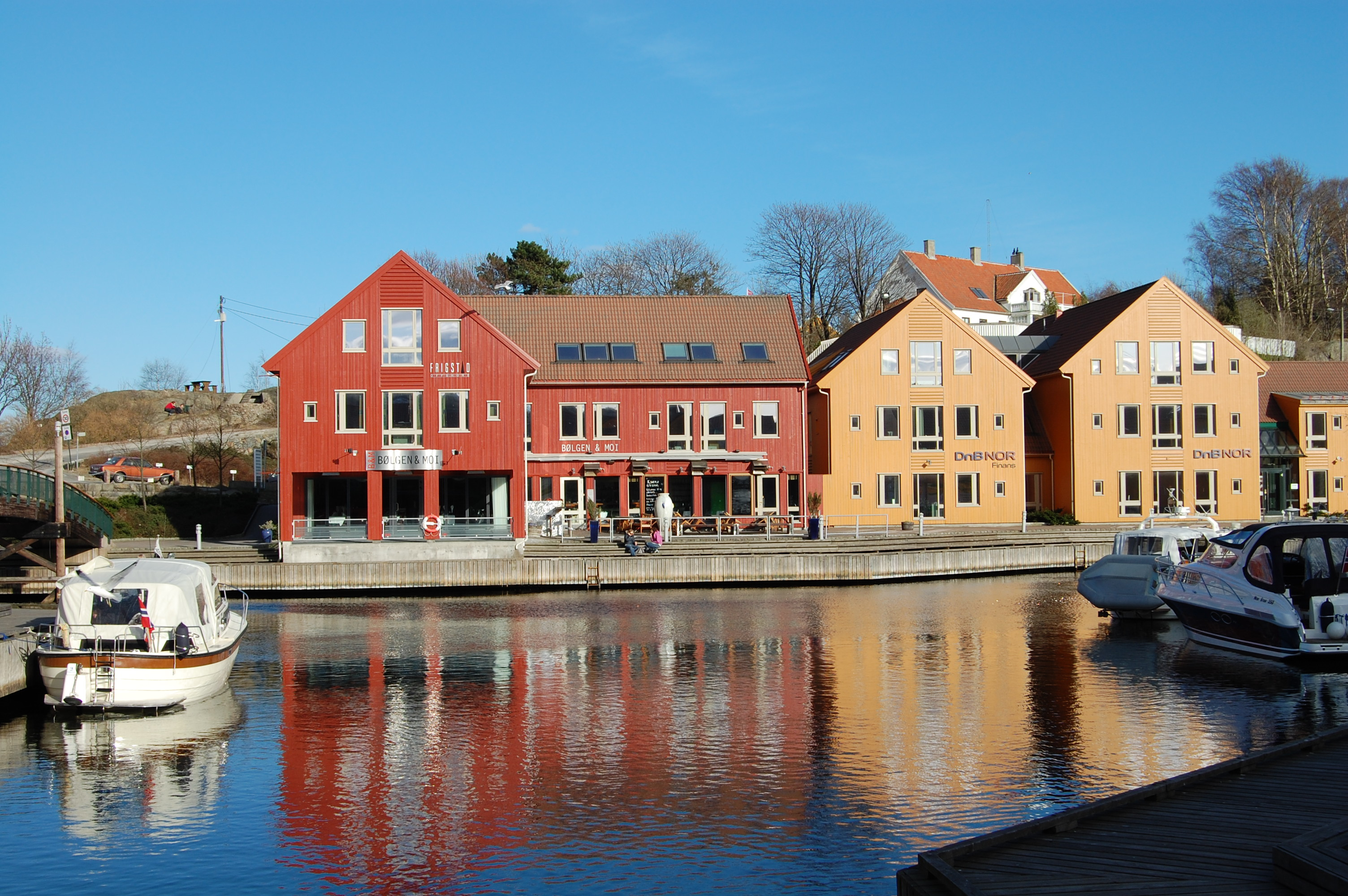 Fra fiskebrygga